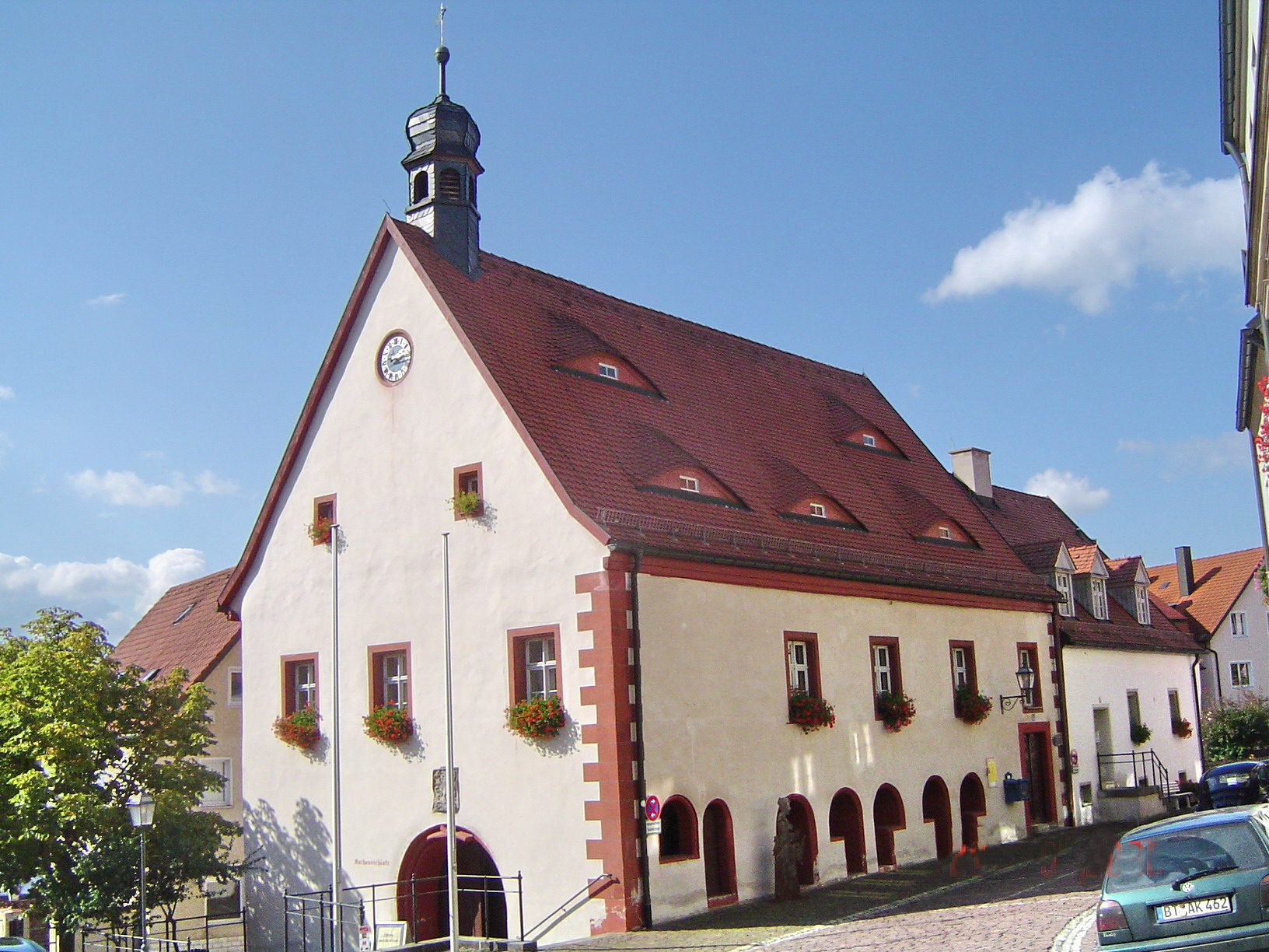 Creußen, Altes Rathaus, Am Alten Rathaus 6, Denkmal D-4-72-127-6